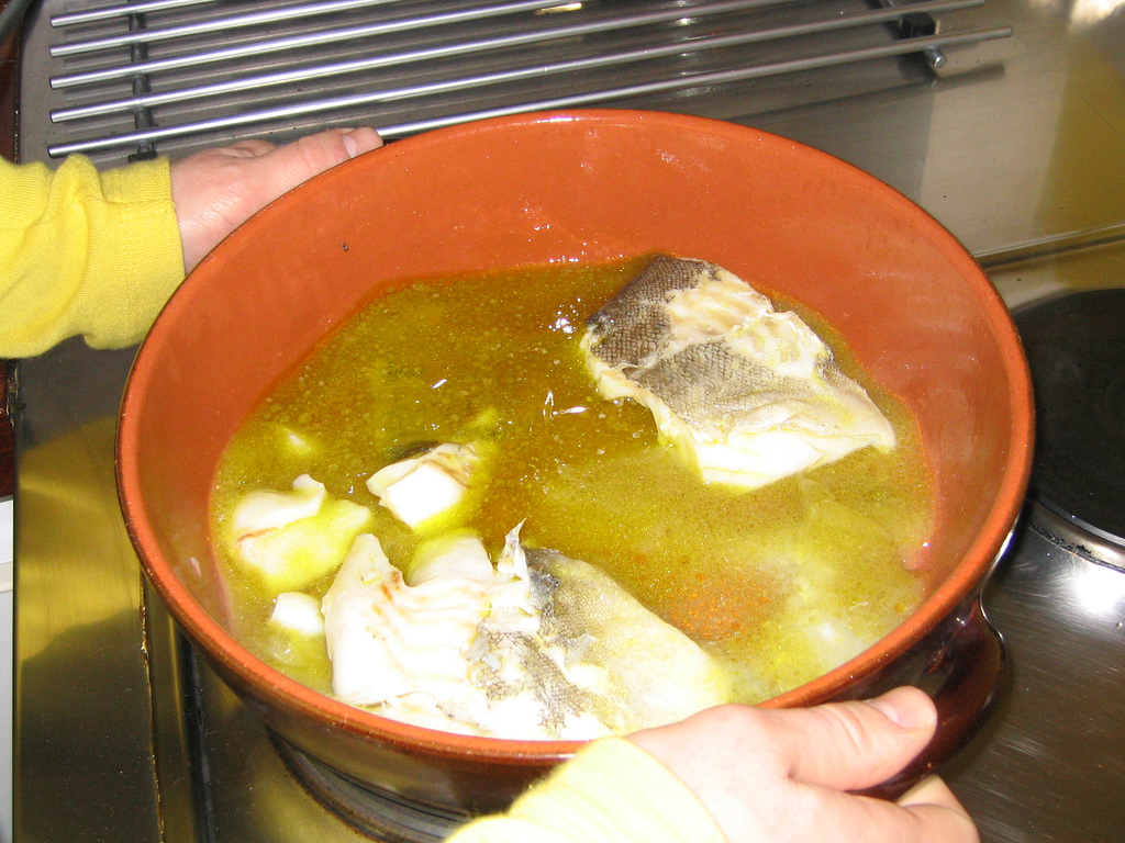 Bacalao al pil-pil. Famous dish from Basque.